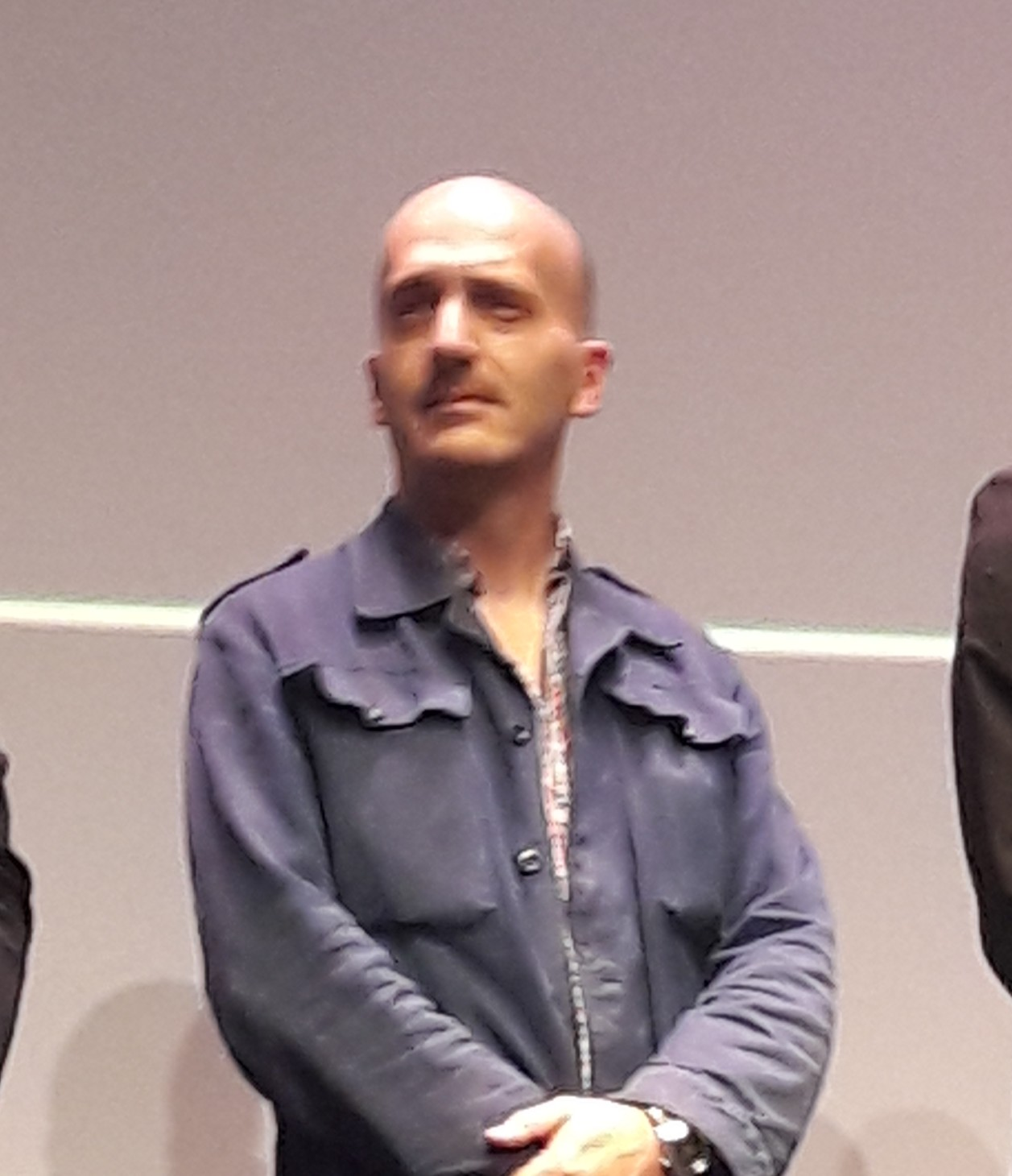 Éric Neveux au festival international du film d'animation d'Annecy 2017